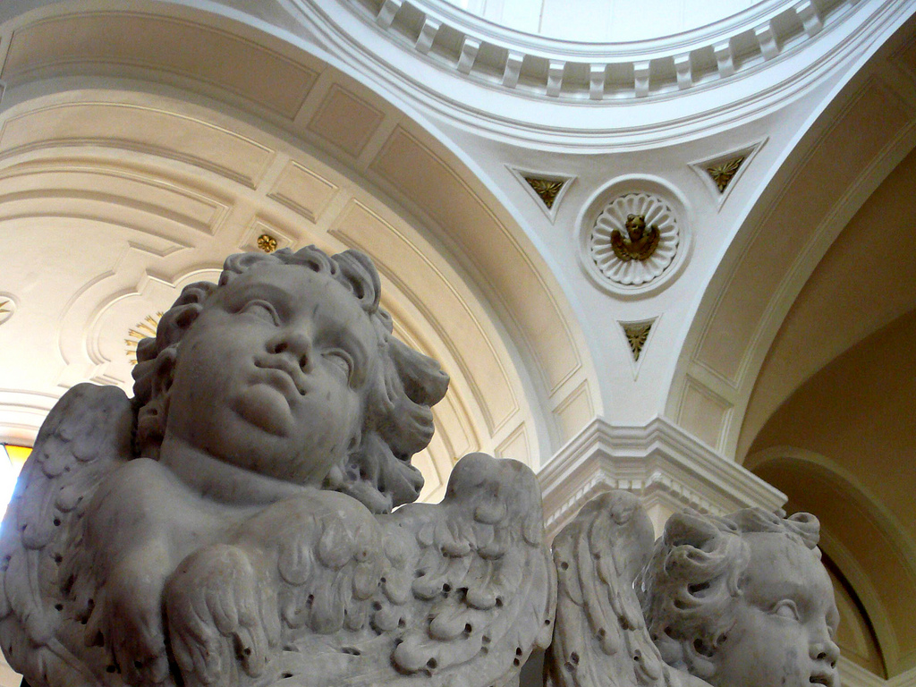 Interno della "Chiesa Madre" di Rionero in Vulture